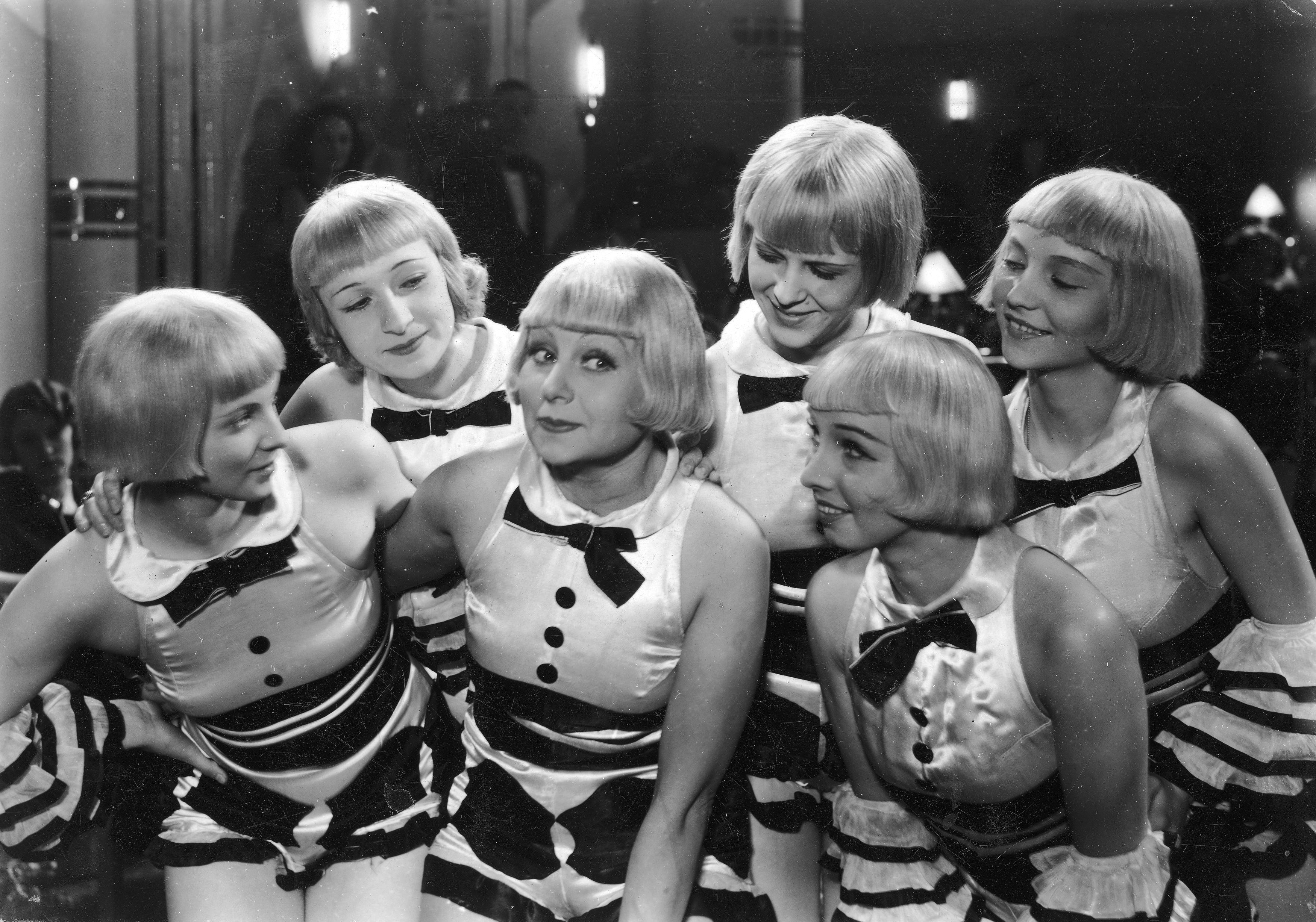 Aktorki w jednej ze scen filmu Zabawka (1933). W środku Zula Pogorzelska jako tancerka Zizi, w 1. rzędzie z prawej - Stefania Górska jako tancerka Mela